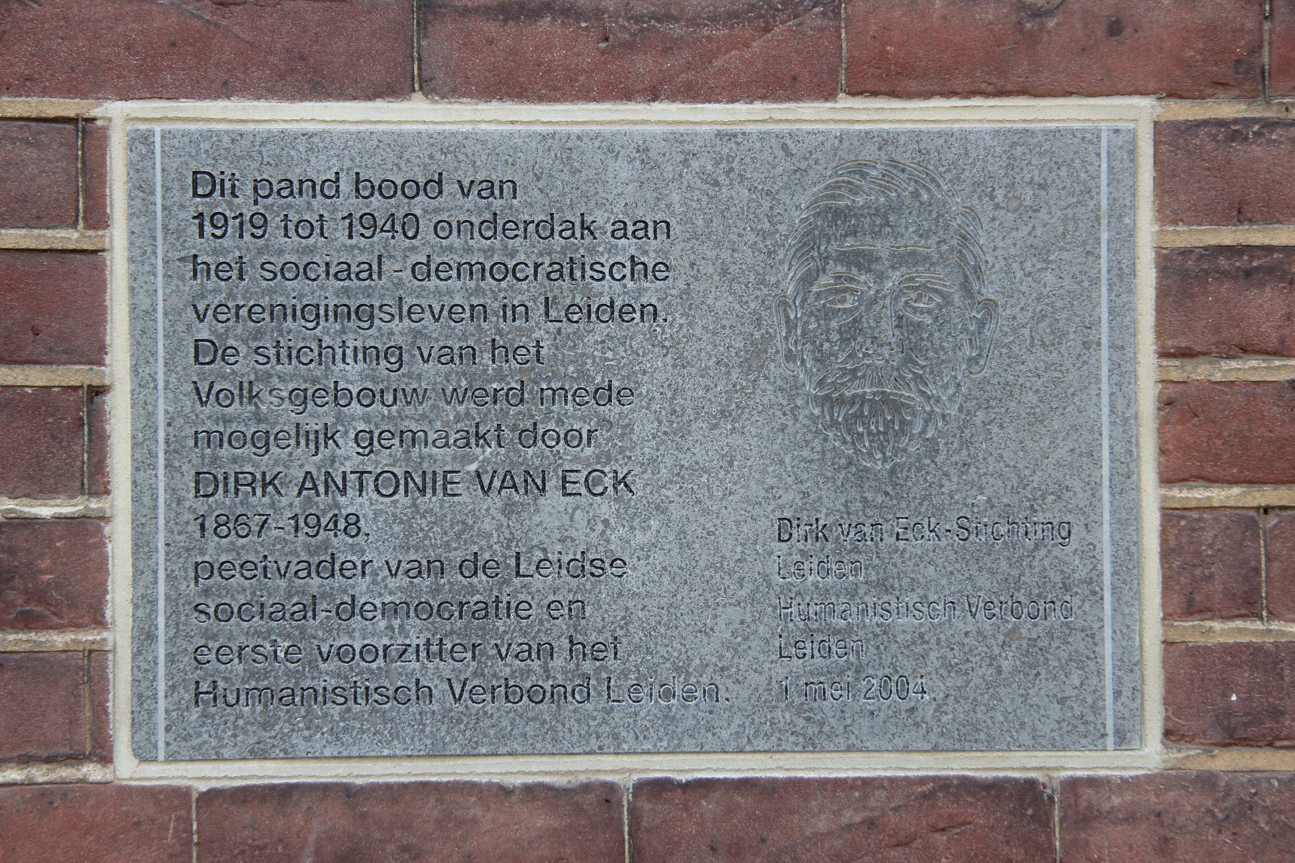 Gevelsteen op het voormalig Volksgebouw Herengracht Leiden